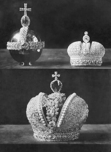 Альбом «Коронация: Москва, май 1896 года..»